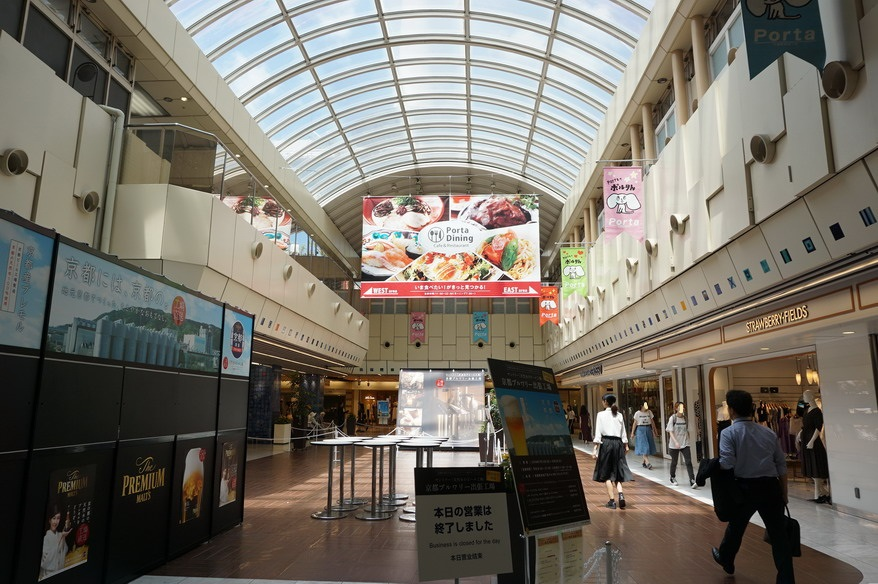 ポルタプラザ